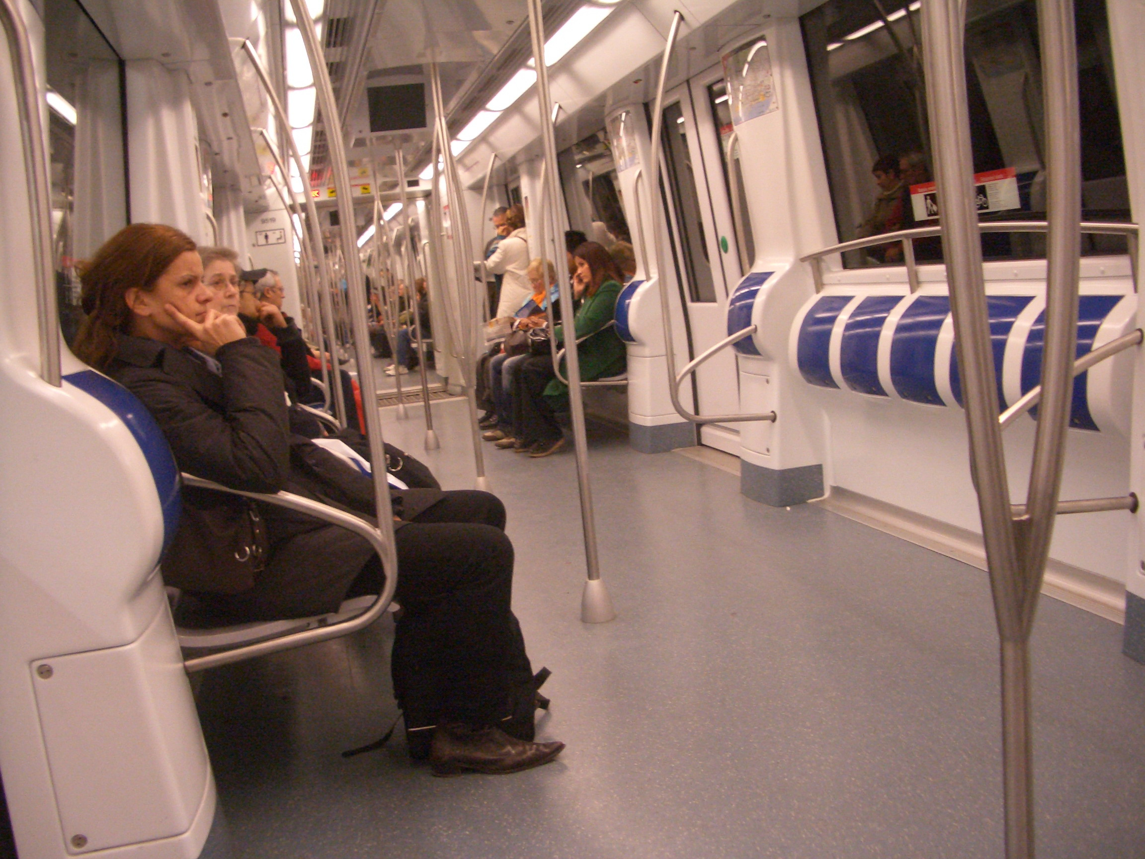 Imagen del metro de Barcelona,España.